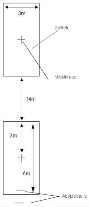 Selbst gezeichnet